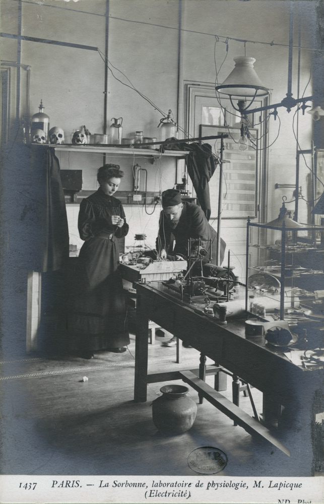 Paris : La Sorbonne, laboratoire de physiologie, M. Lapicque (électricité) Edition : Paris : Maison parisienne Neurdein (ND. Phot.), s.d. Collection BIU Santé Médecine